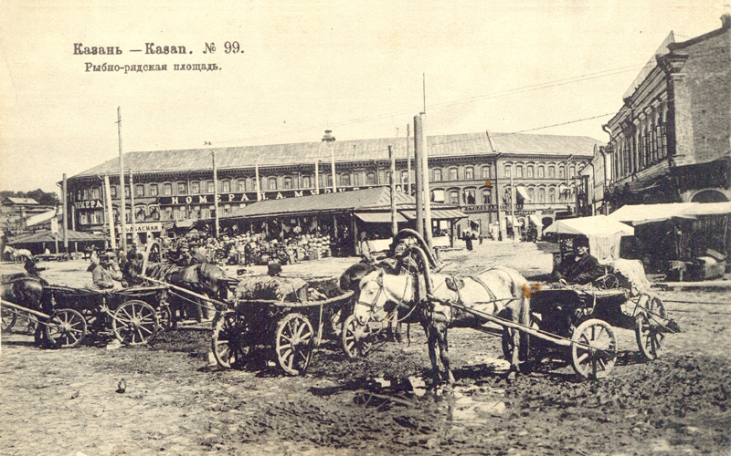 Рыбнорядская площадь начала XX века. Фотооткрытка.